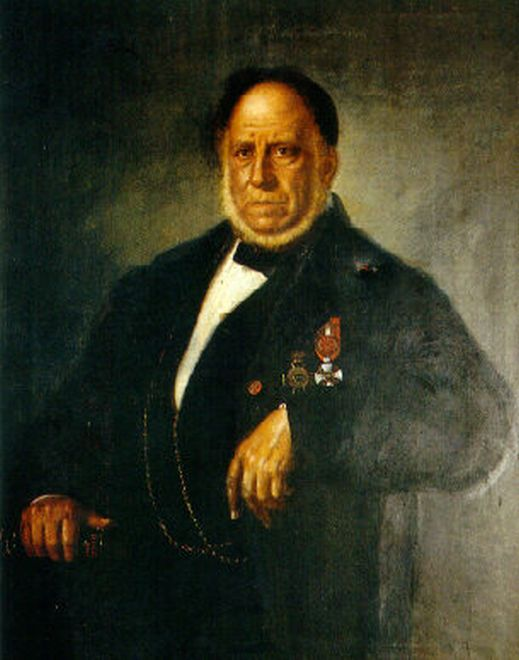 Portrait